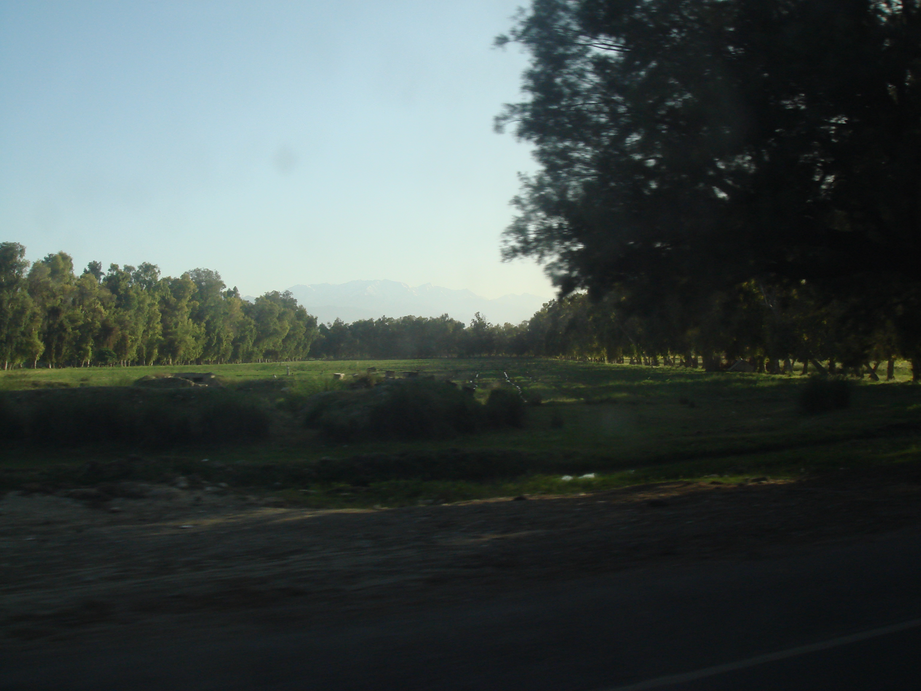 A view of greenery in Jalalabad, Afghanistan.